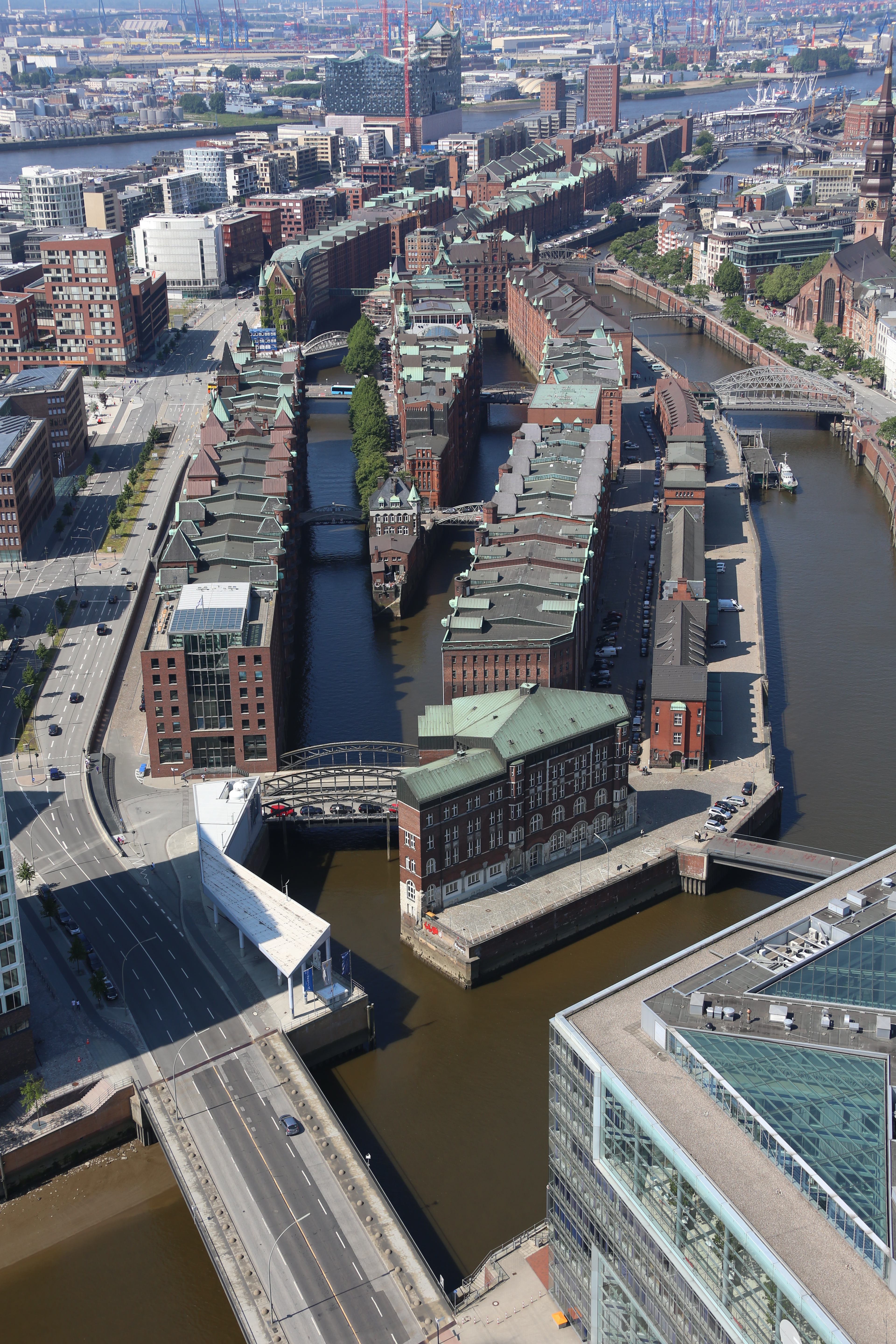 Projekt Heißluftballon, Fahrt über Hamburg und Umgebung., Blick von Osten Hamburg's Speicherstadt (meaning: "warehouse city") ist the world's largest warehouse complex. It's grounded on oak foundations, built in 1888 and since 1991 it is declared a historic monument. This is a photograph of an architectural monument. 11867 11886 11975-11977 12072-12086 12091 12189-12200 12276-12279 12333-12336 12415-12475 12477-12489 12498-12501 12879-12886 13378 13725-13729 14151 14794 14863-14864 14879-14896 14969-14978